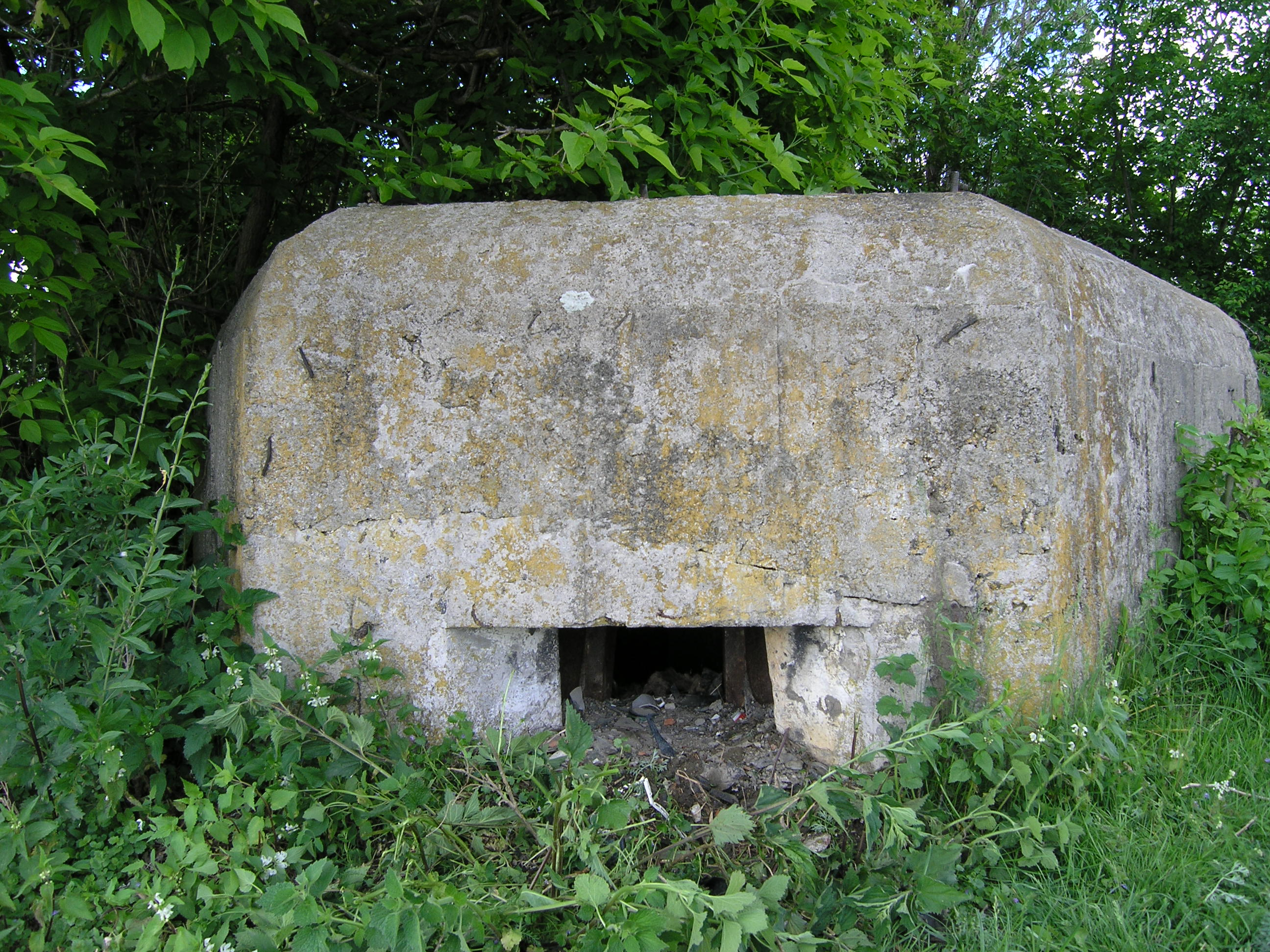 Довготривала вогнева споруда, Ялтушків, південно — західна окраїна